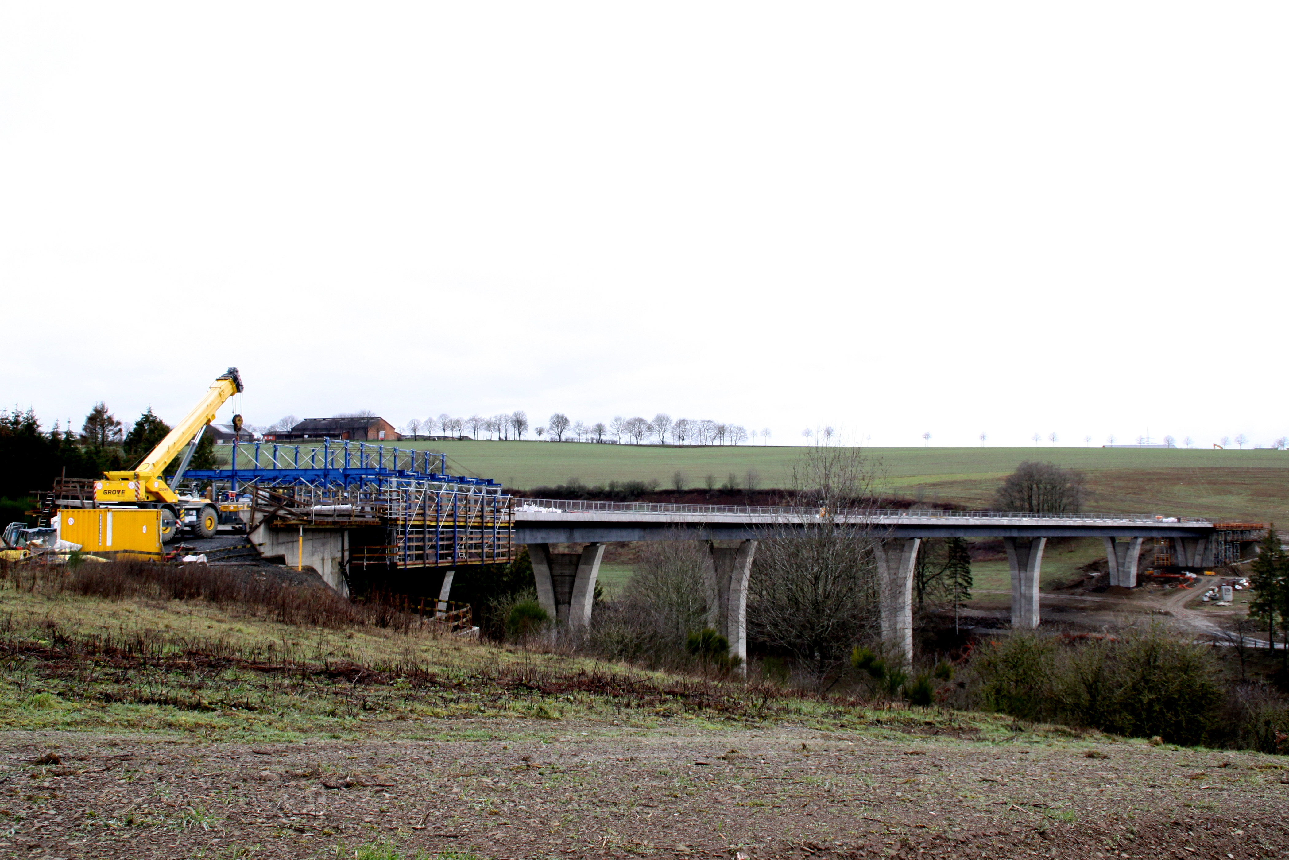 Den Irbich-Viaduc am Bau (Mäerz 2019)